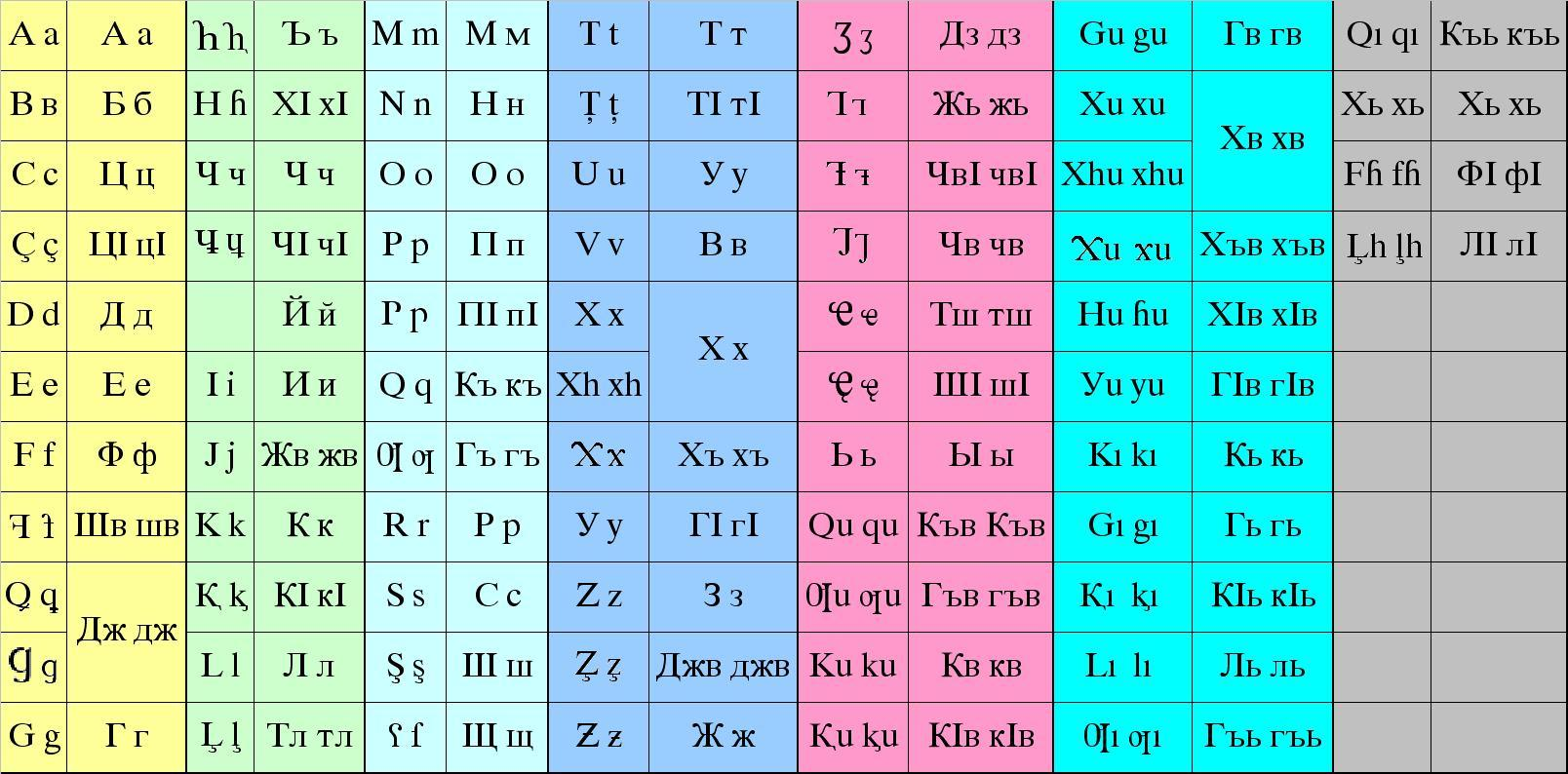 Abaza latin & cyrillic alphabets